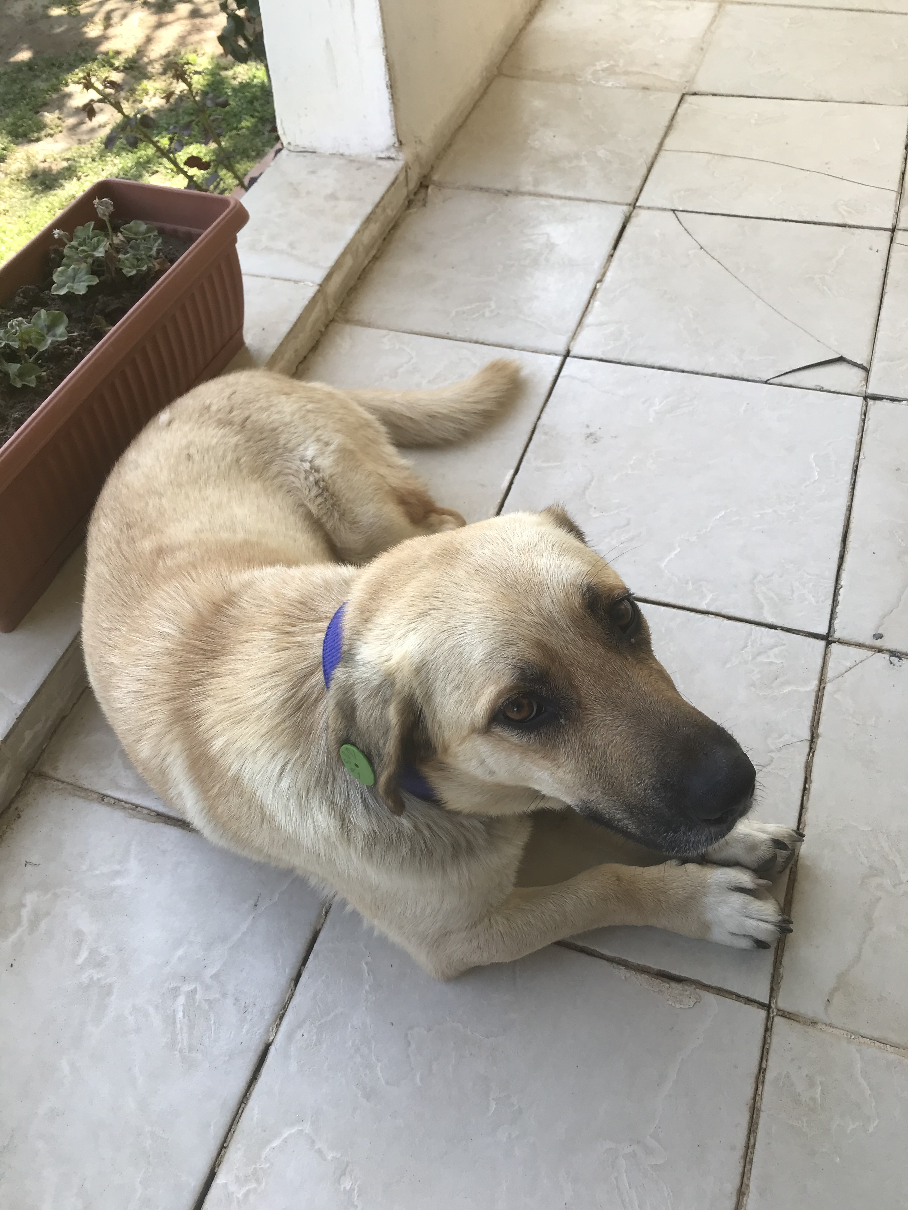 Oturan bir sokak köpeği